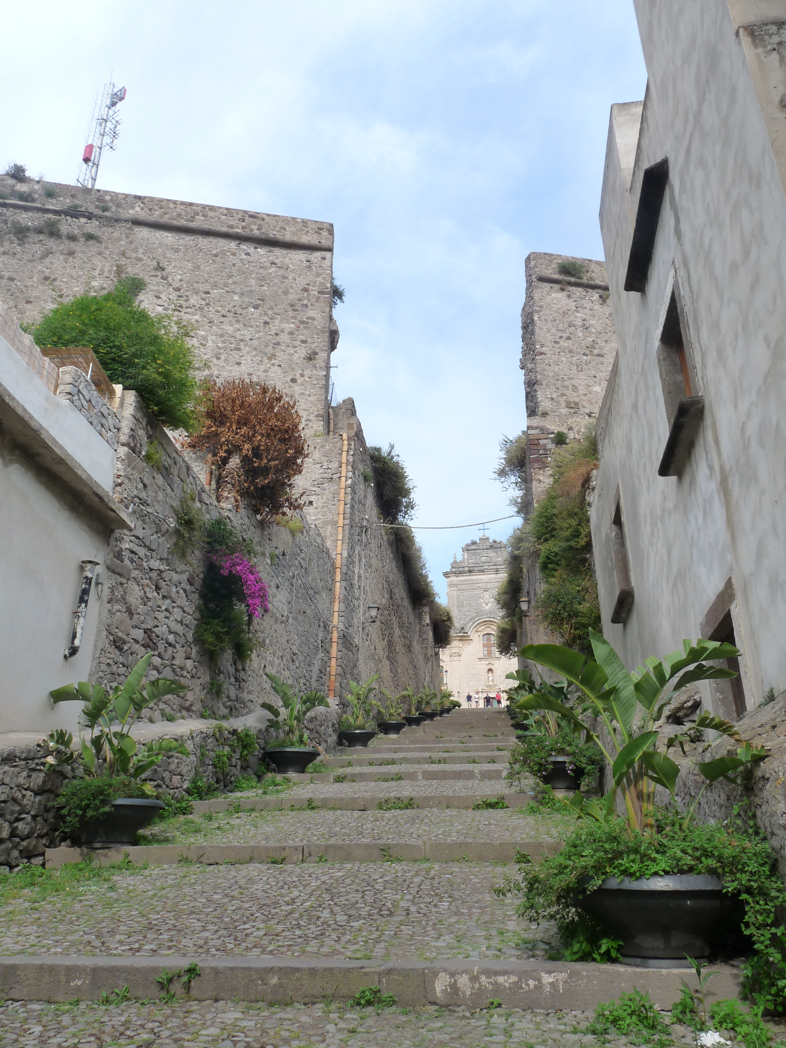 Lipari (îles Eoliennes, Sicile) : rue montant vers la cathédrale (Via del Concordato)